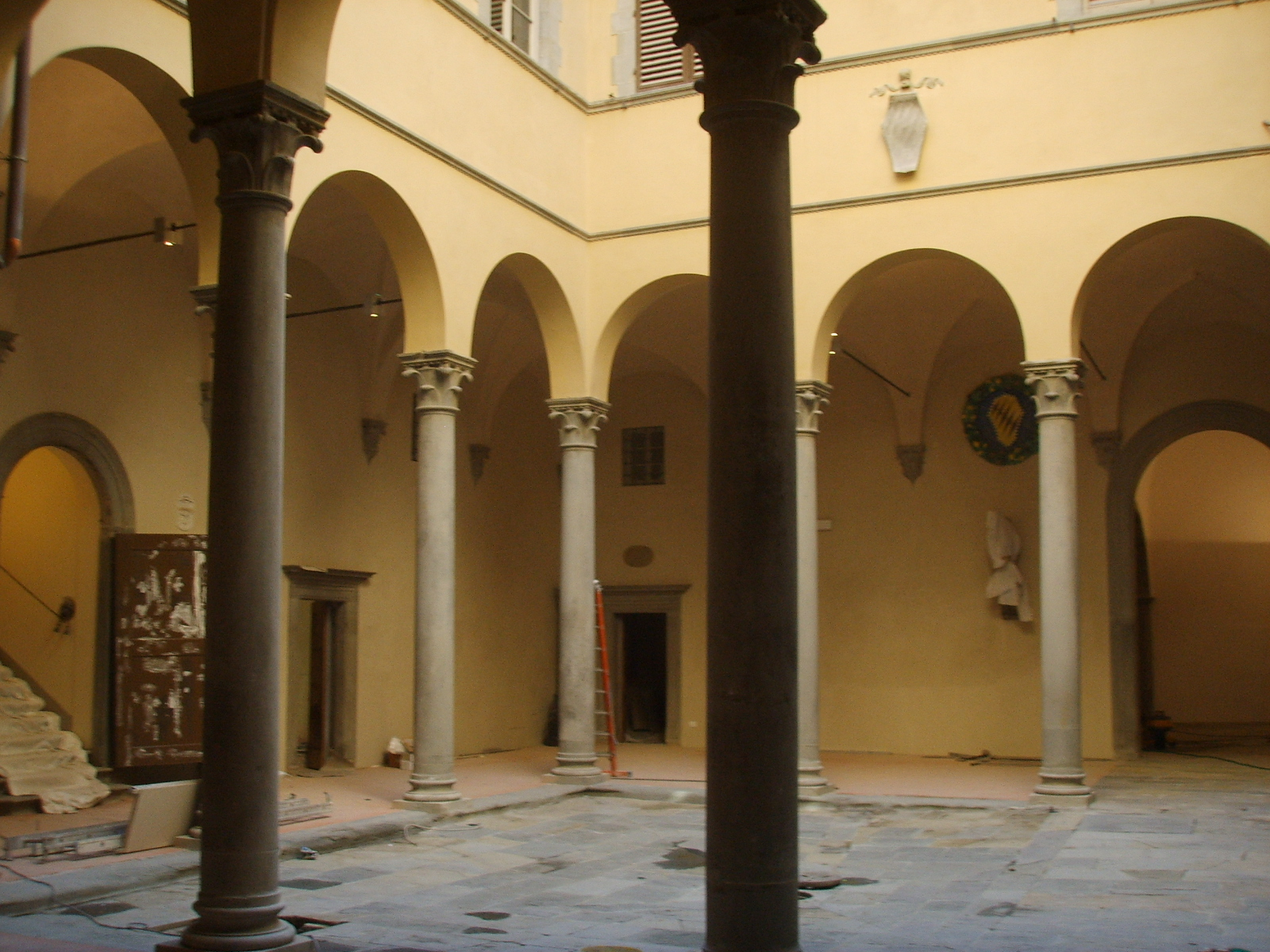 Palazzo de' Bardi, cortile 02